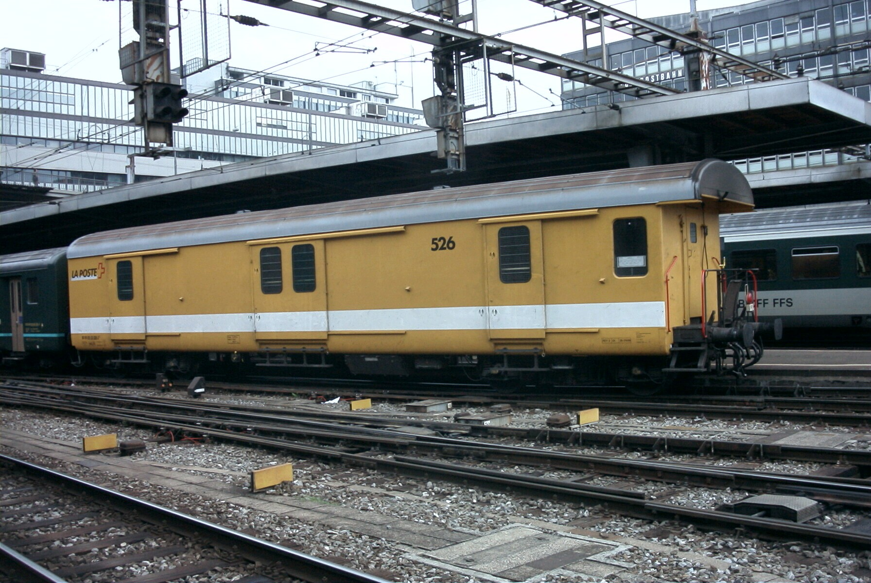 Paketpostwagen 526 in Bern